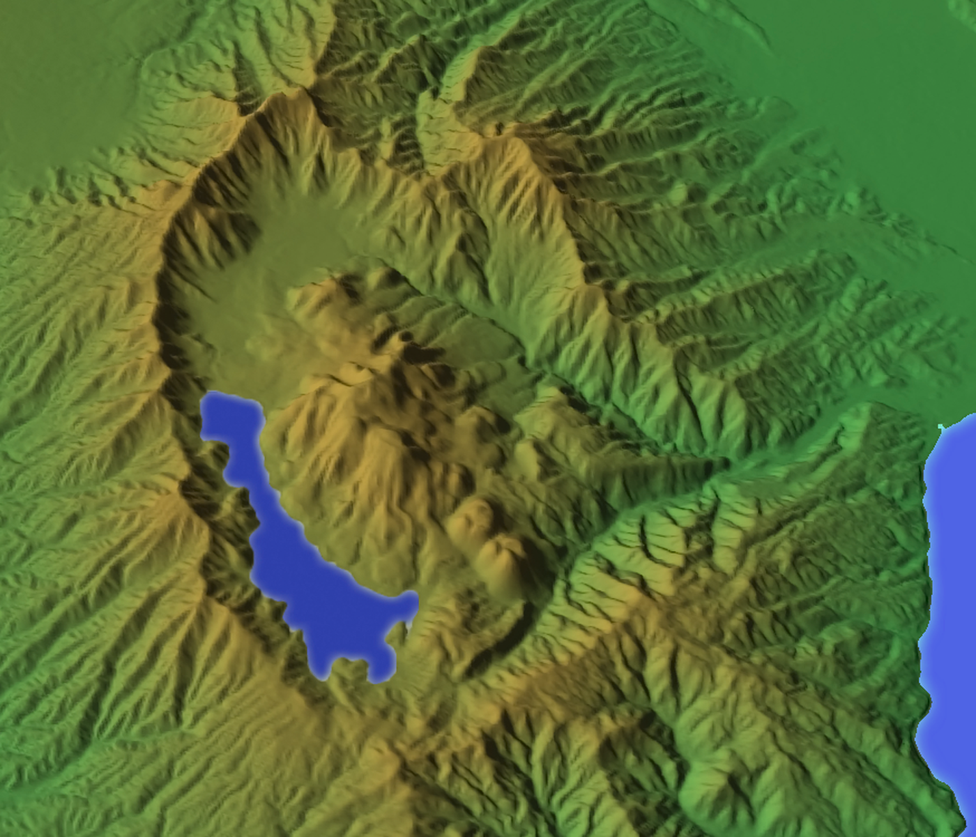 箱根山地のCG画像。カシミール3Dを使用し作成。編集。